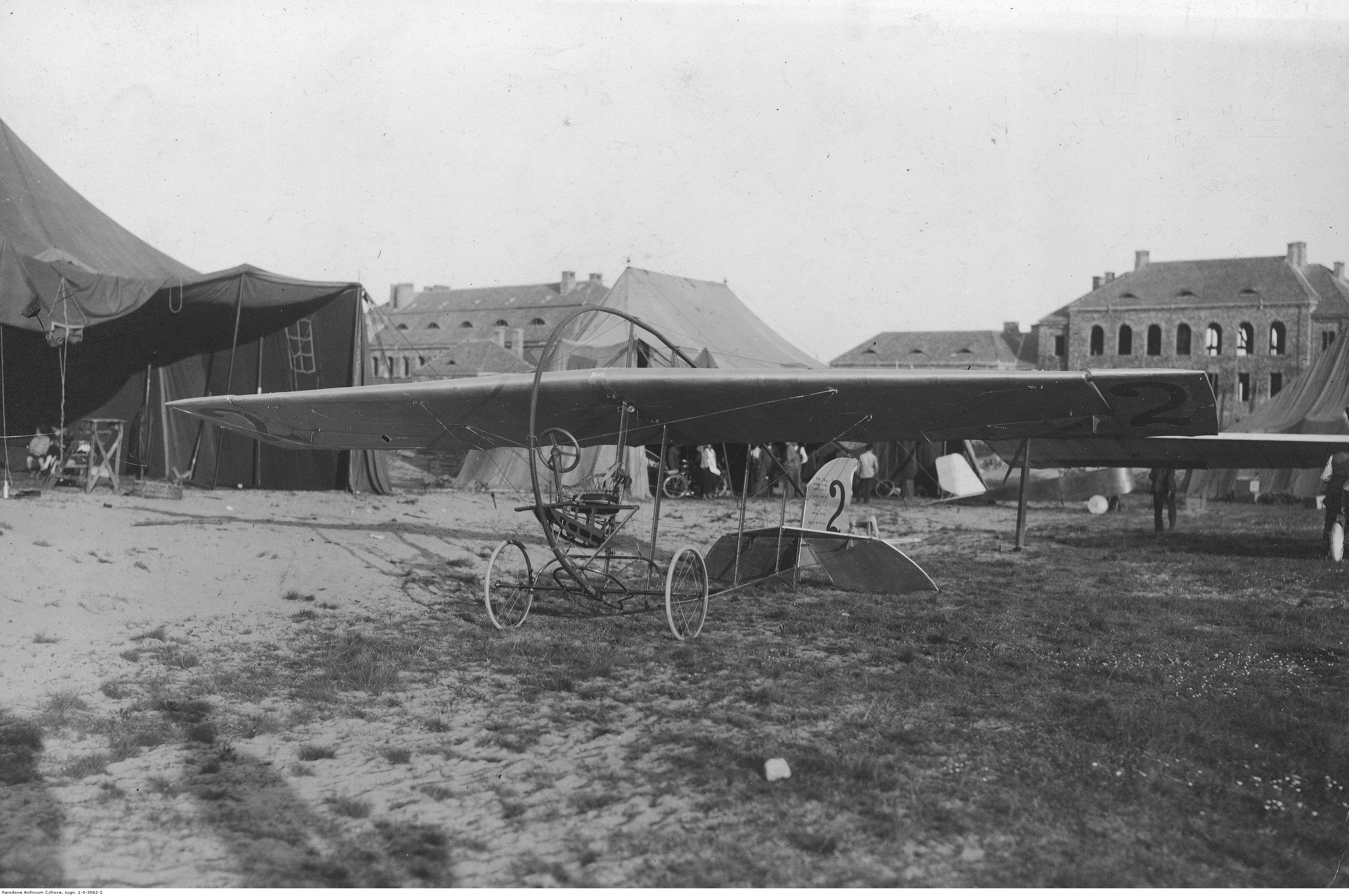 Szybowiec Bydgoszczanka. II Ogólnopolski Konkurs Szybowcowy w Gdyni, 1925 r.